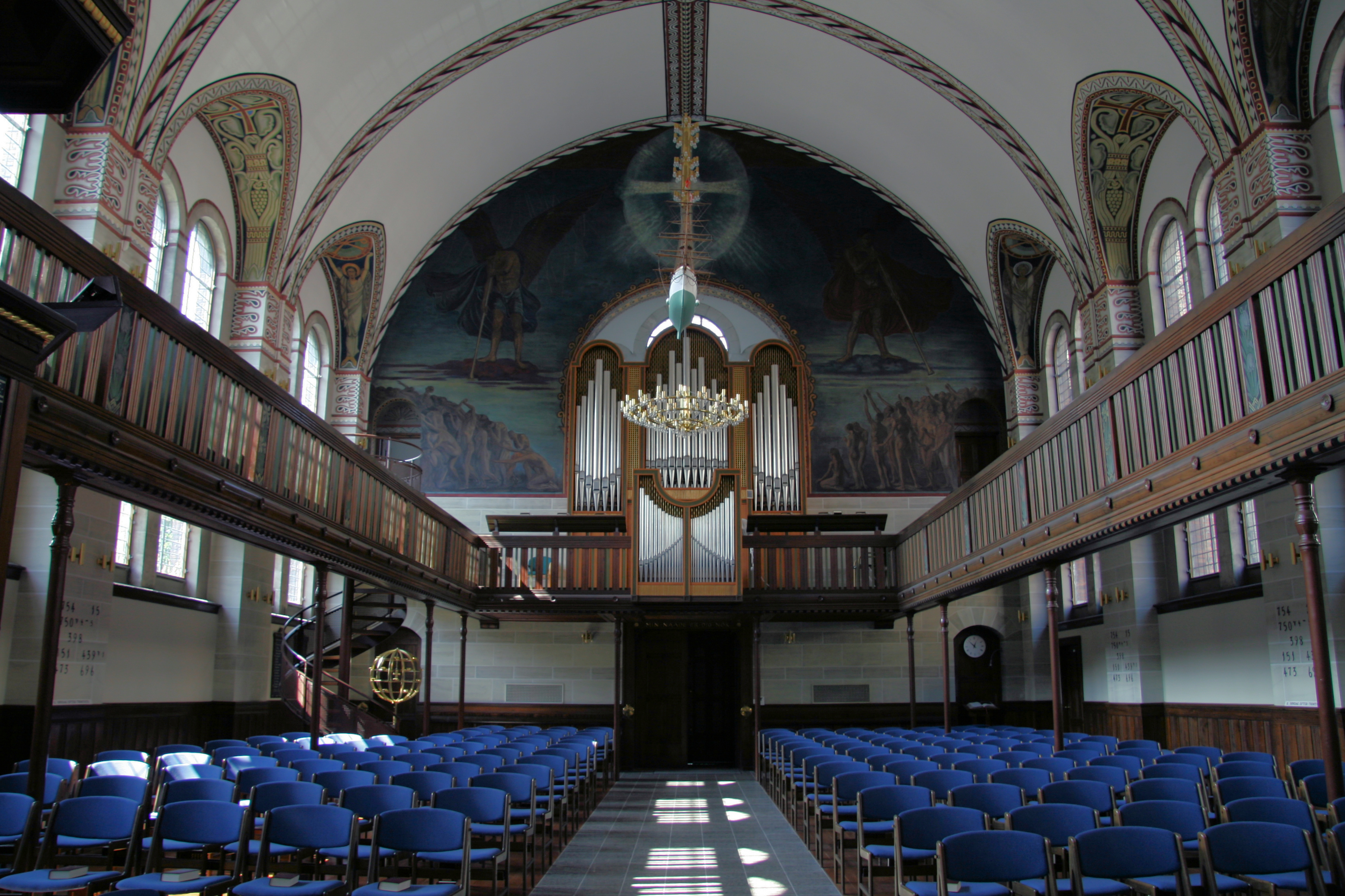 Sions Kirke in Copenhagen, Denmark. Interior viewed from altar.